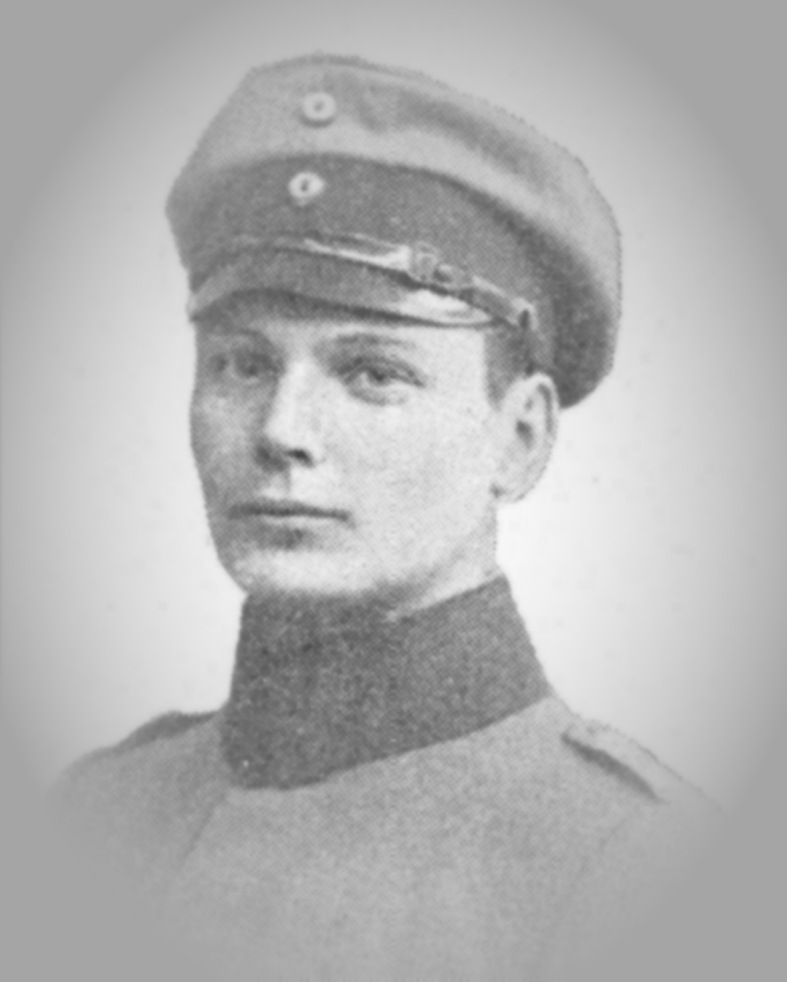 Gustaf Verner Jeremias Gustafsson